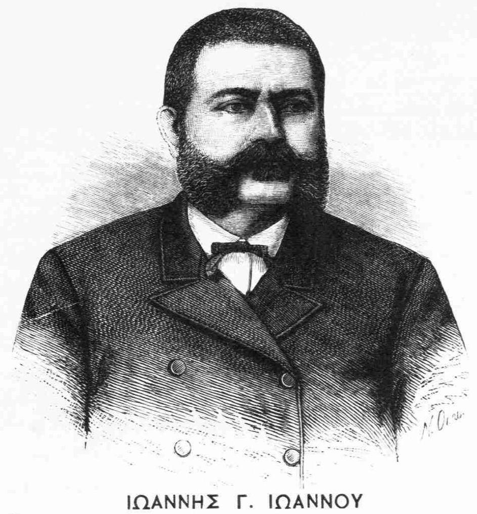 Griechische Persönlichkeit 19. Jahrhundert